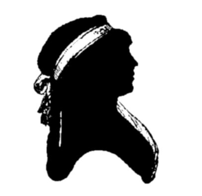 Meta Forkel Liebeskind, Silhouette